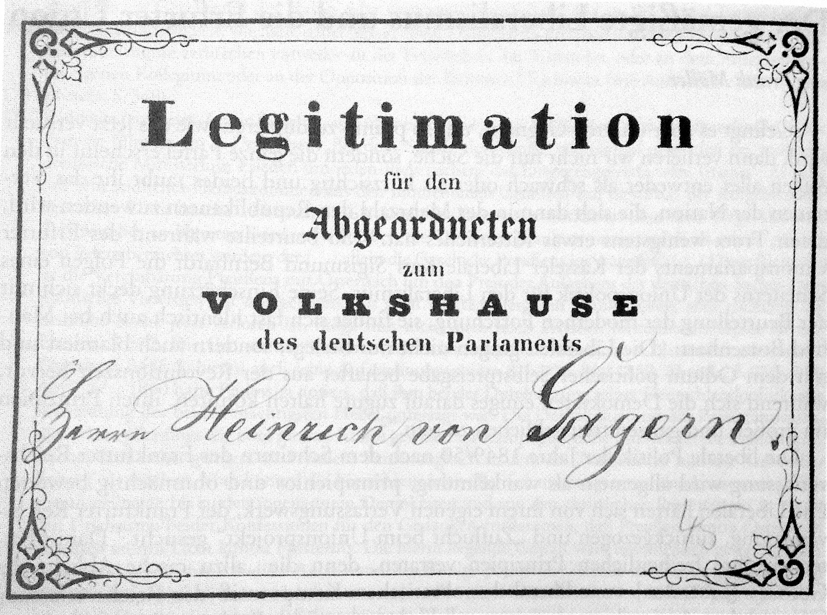 Legitimationskarte für Heinrich von Gagern, Volkshaus des deutschen Parlaments.